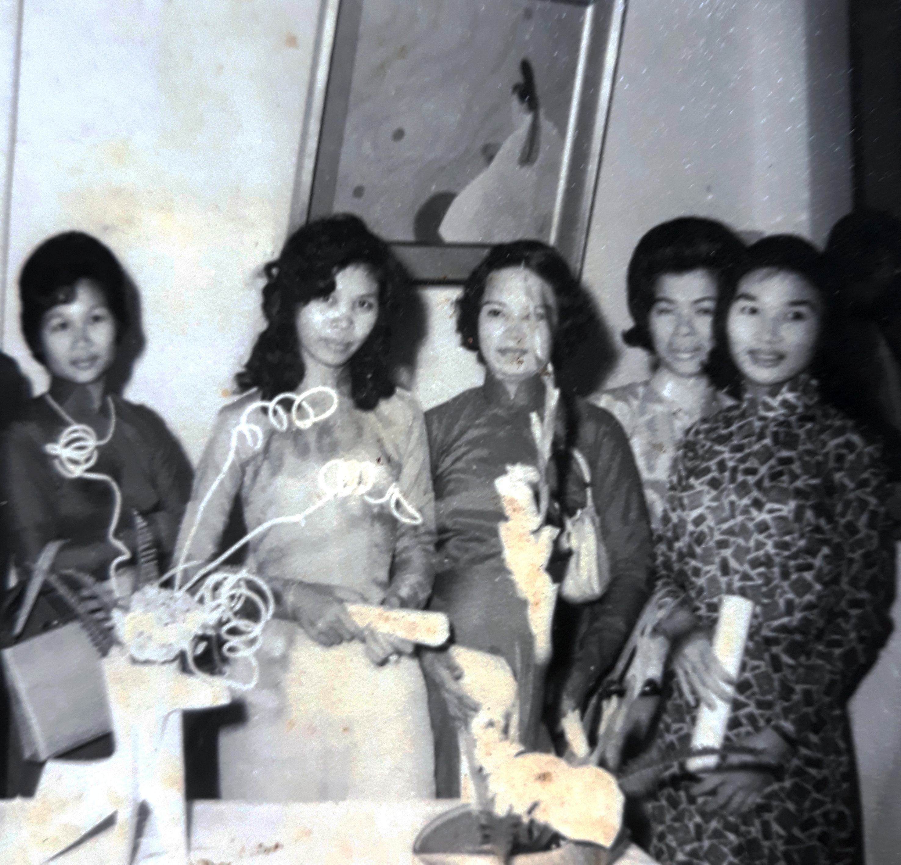 Áo dài Saigon 1960